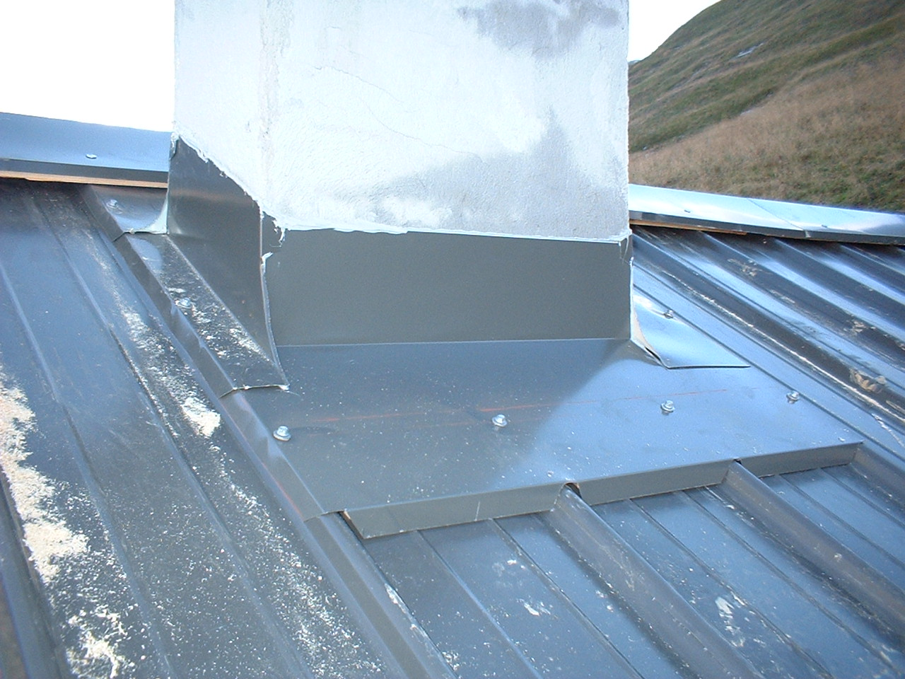 abergement en tôles prélaquée, posé sans soudures, sur souche maçonnée, raccord avec tôles prélaquées nervurée 283NR